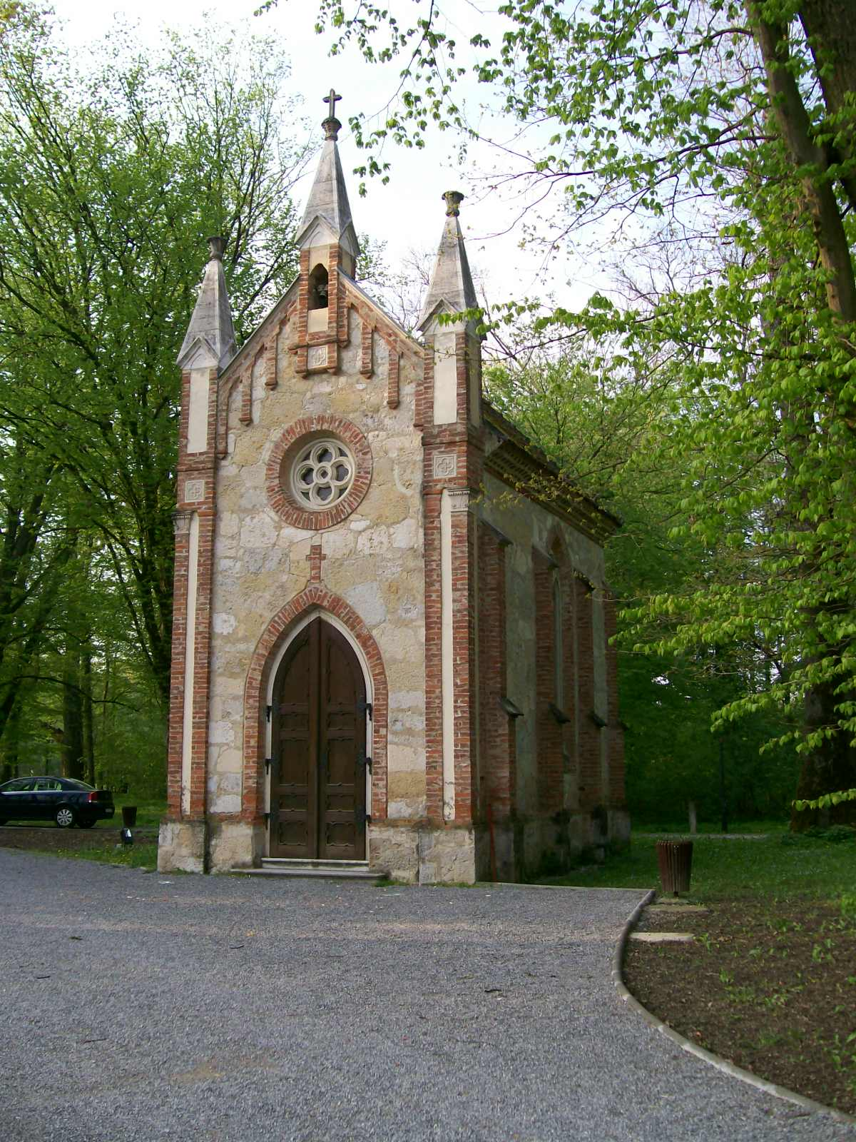 Kapela sv. Josipa u sklopu kompleksa Novih nova pokraj Zaprešića